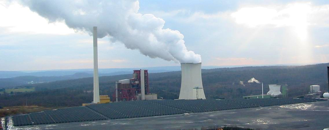 Fotovolatikanlage auf dem Absinkweiher Grube Göttelborn. Ausbaustufe Januar 2005.